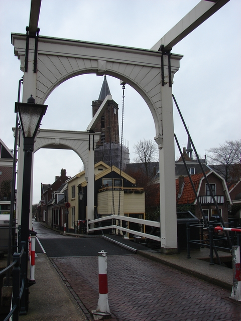 Nedersaksies: Loenen_anzicht.jpg